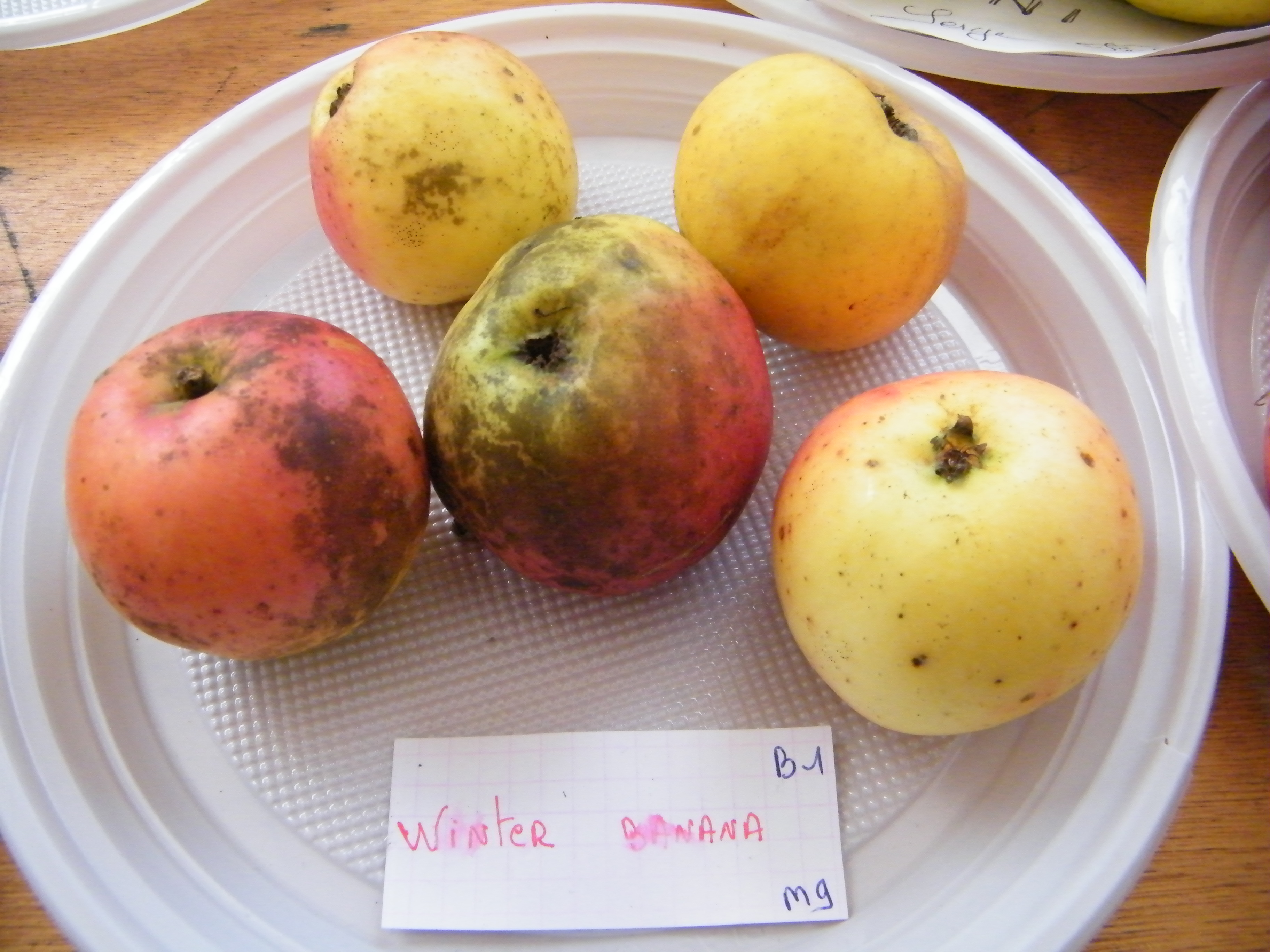 Winter Banana, Mons-Boubert, Somme, Fr, expo du 29-10-2017 (46)